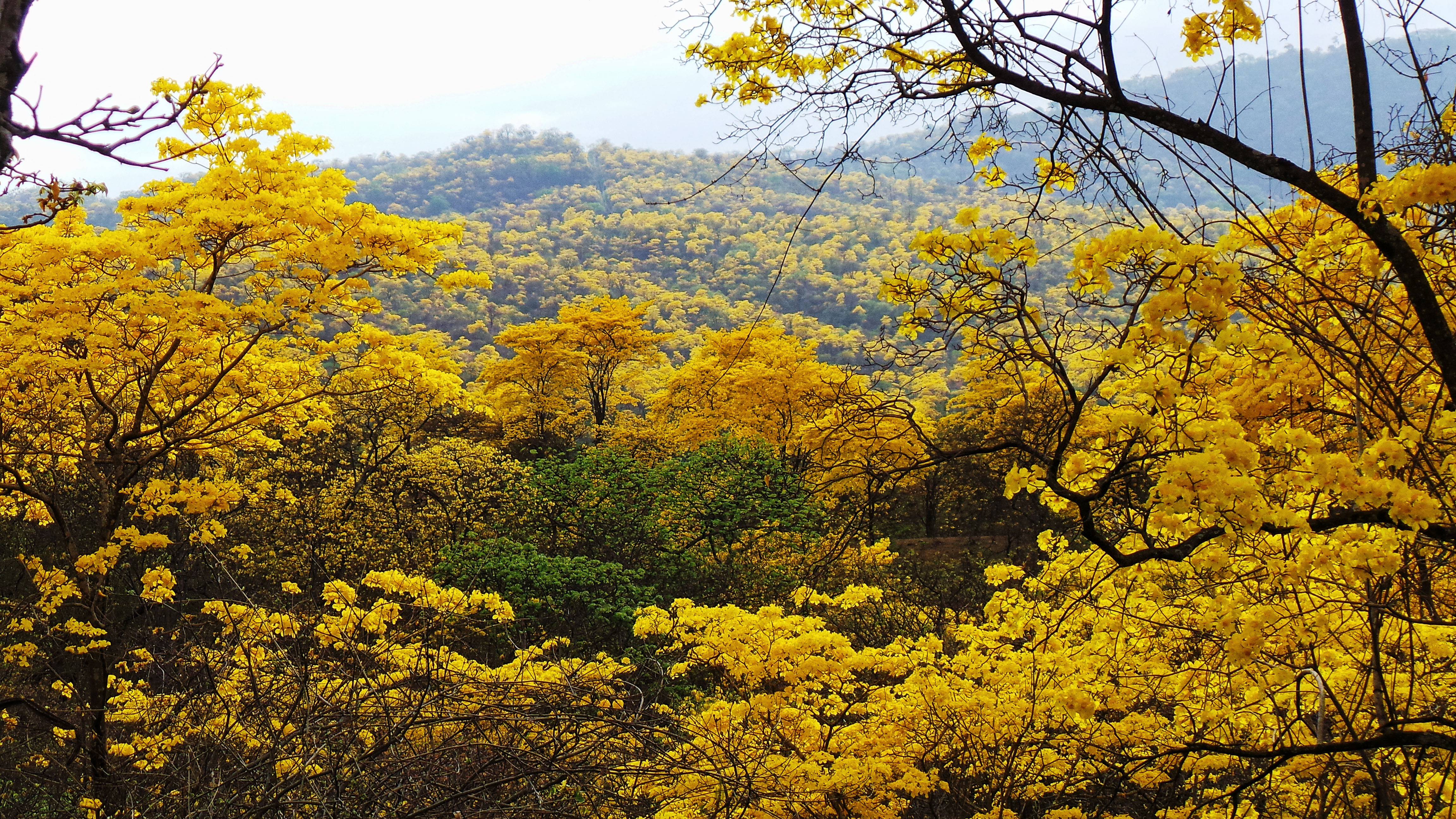 Mangahurco